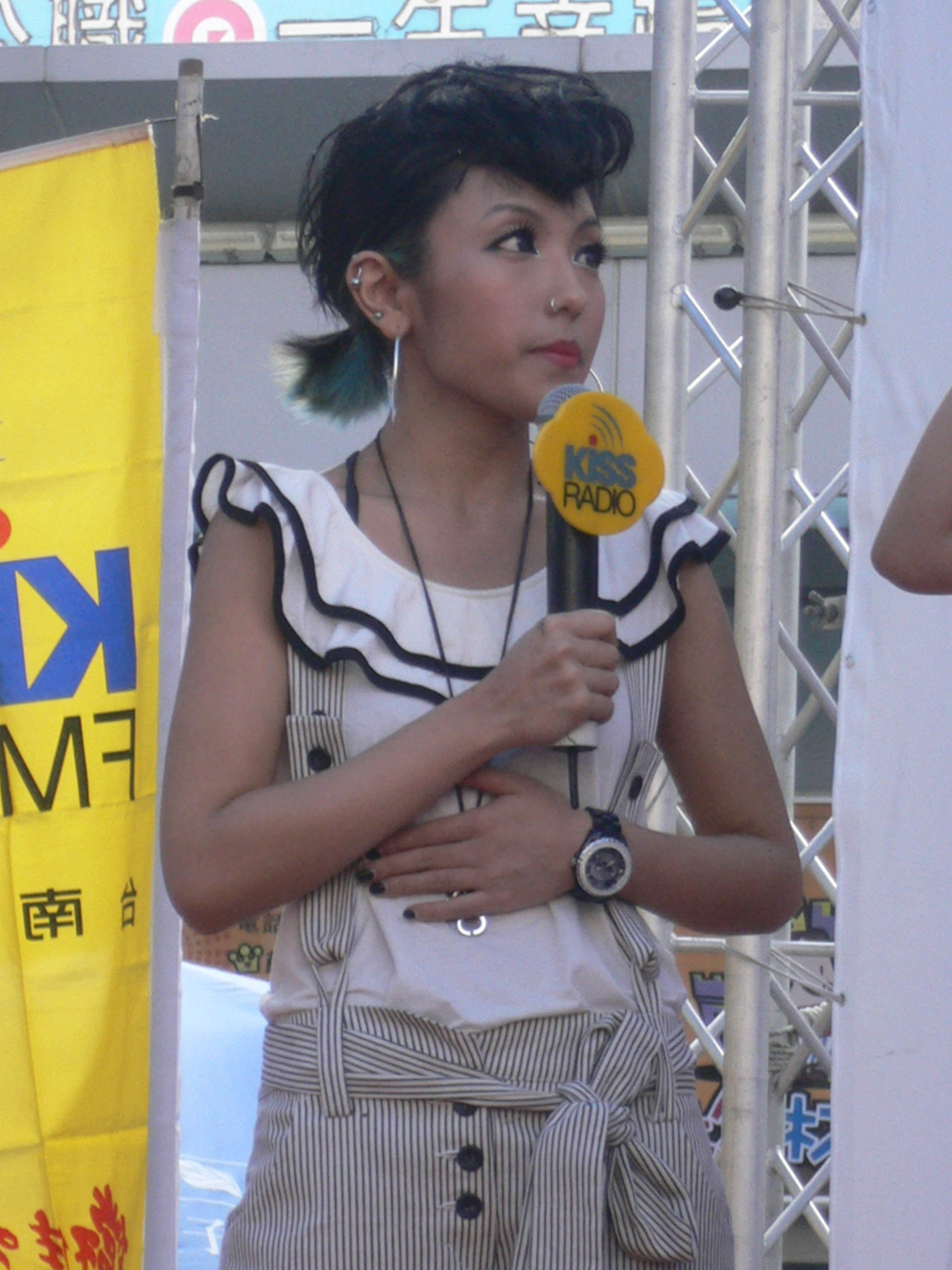 鍾舒祺在《不一樣》的台南簽唱會